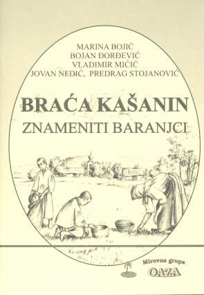 Braća Kašanin : znameniti Baranjci; autori Marina Bojić, Bojan Đorđević, Vladimir Mićić, Jovan Nedić, Predrag Stojanović, Beli Manastir, Mirovna grupa Oaza, 2007; ISBN 953-95299-1-3